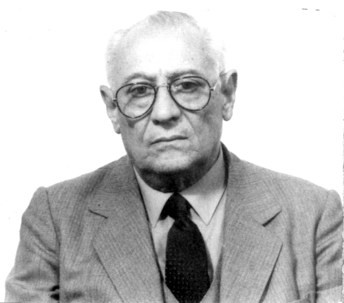 Juan Carlos Pugliese